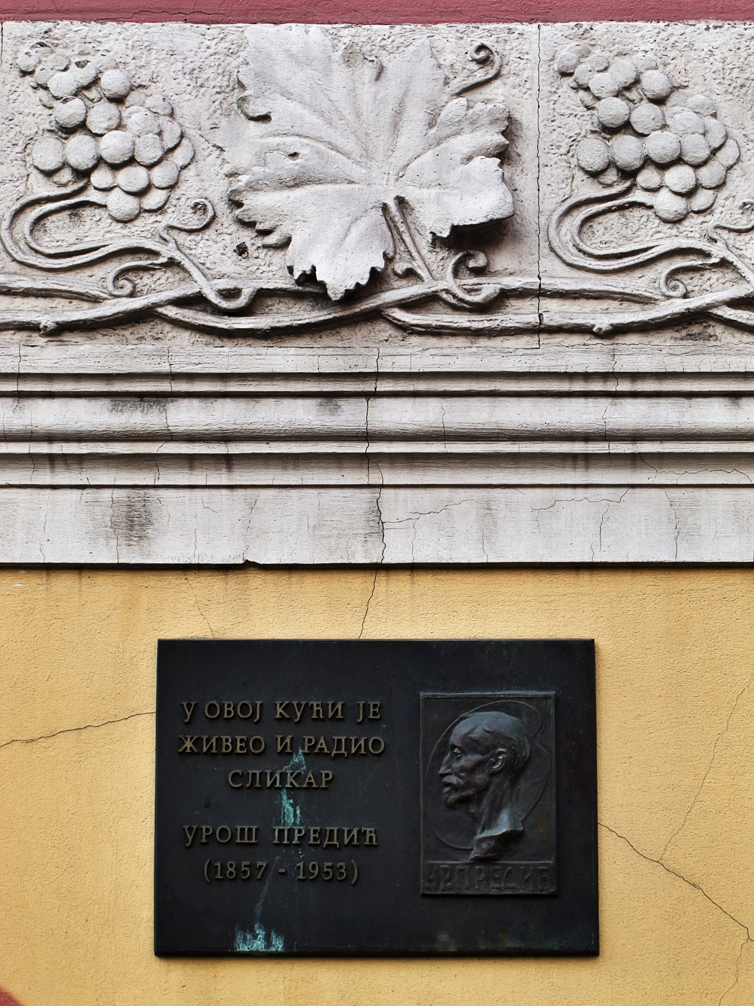 Атеље Уроша Предића (детаљ фасаде са спомен плочом), Светогорска 27, Стари град, Београд, Србија